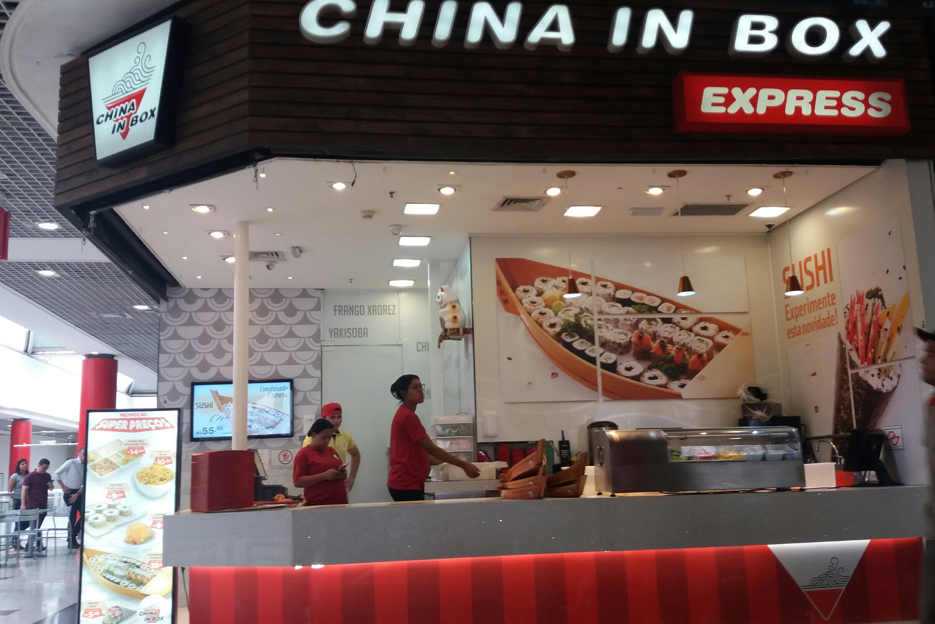 Filial da rede China in Box no Shopping Boulevard Tatuapé